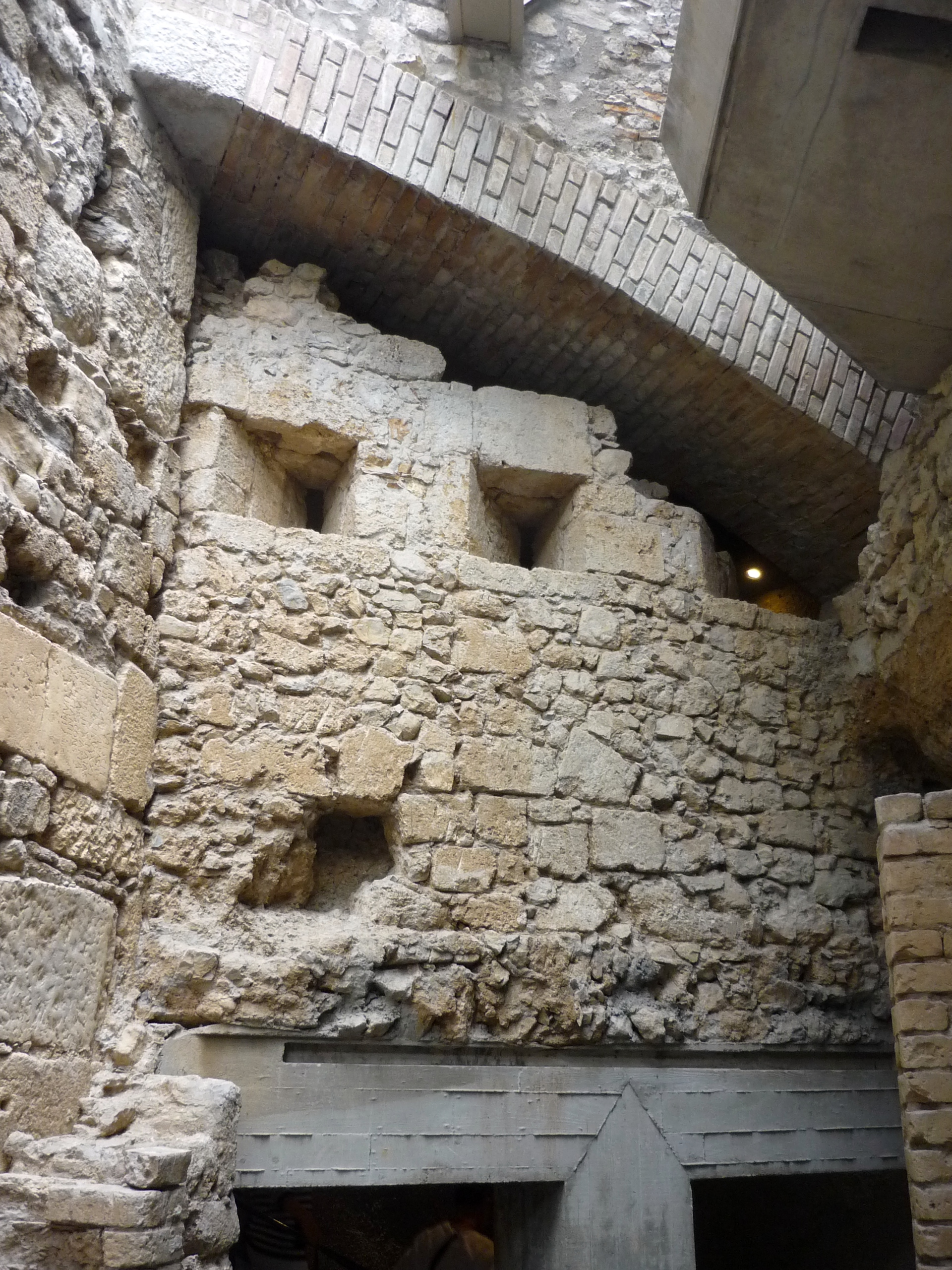 Façade de l'église Saint-Laurent, musée archéologique de Grenoble, Isère, France